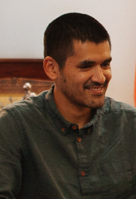 La presidenta de la República, Michelle Bachelet, junto al ministro de Cultura, Ernesto Ottone recibió a los creadores del cortometraje “Historia de un Oso”, Gabriel Osorio y Patricio Escala, quienes el domingo 28 de febrero recibieron el primer Oscar a una producción audiovisual creada en Chile por realizadores nacionales.